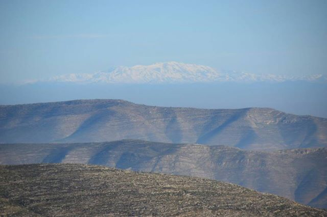 מבט צפונה מהר כביר אל הר החרמון